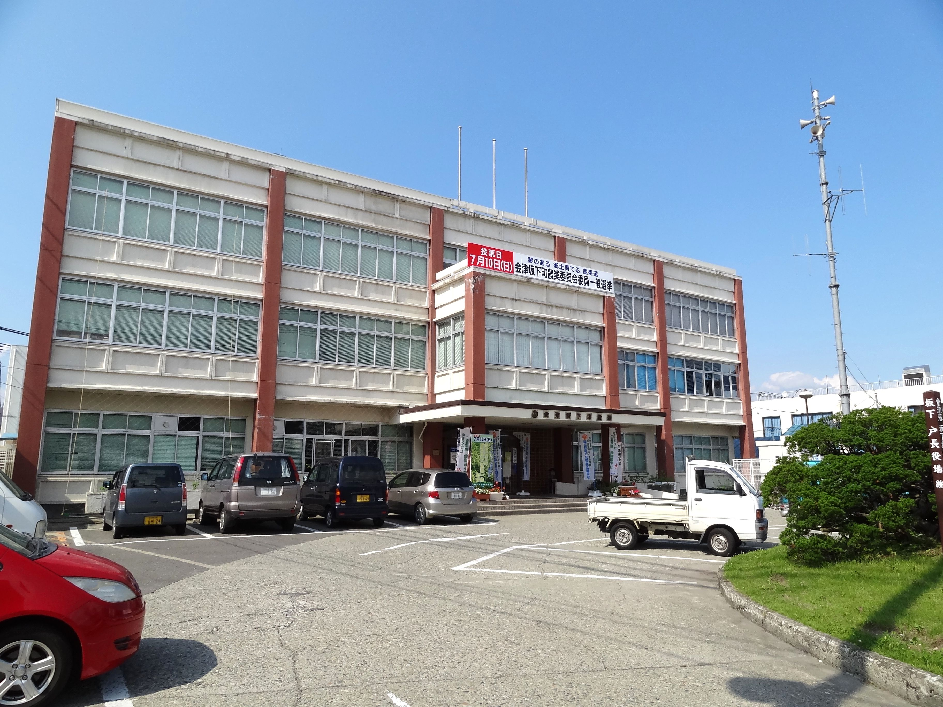 会津坂下町役場